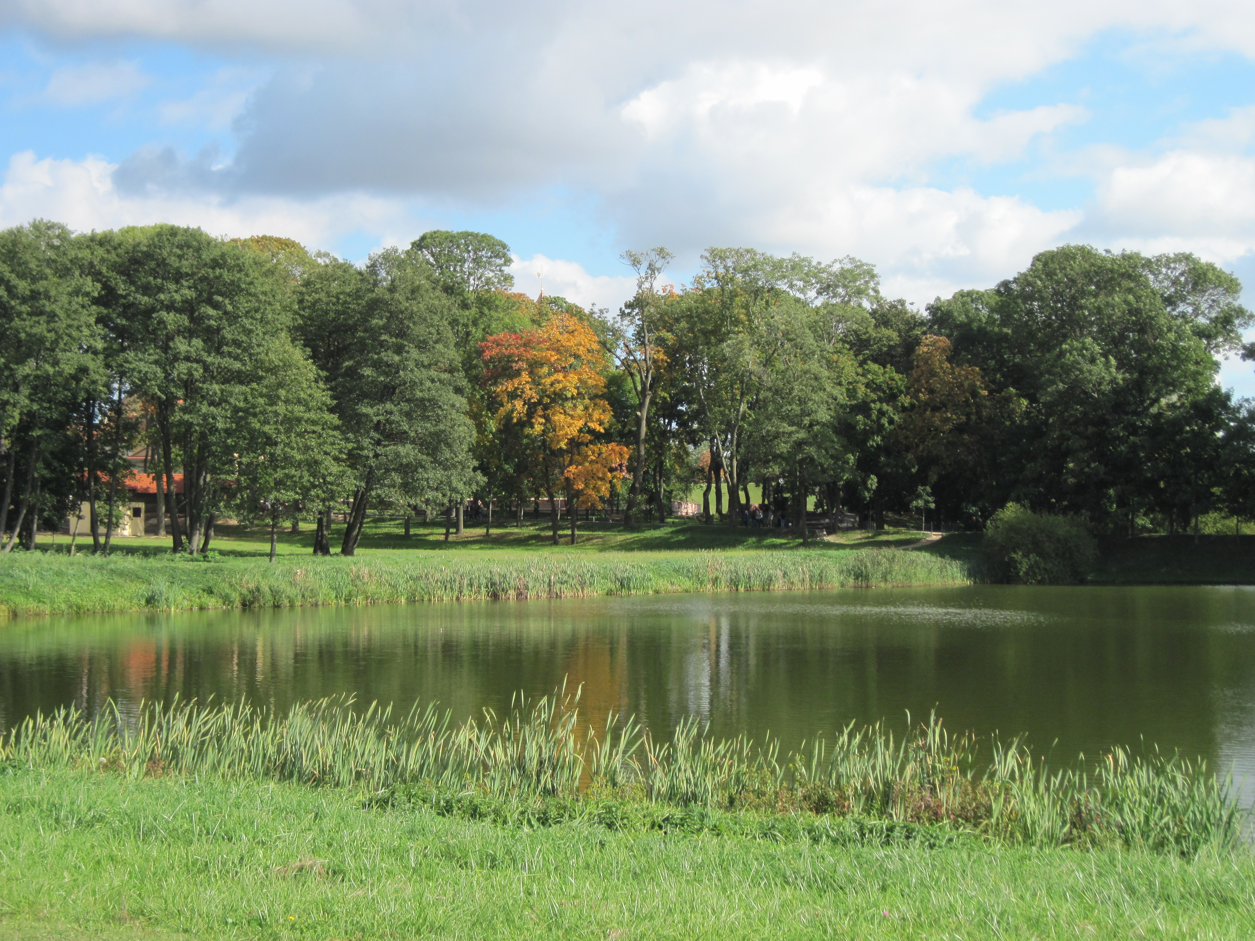 Замкавы парк у Нясвіжы